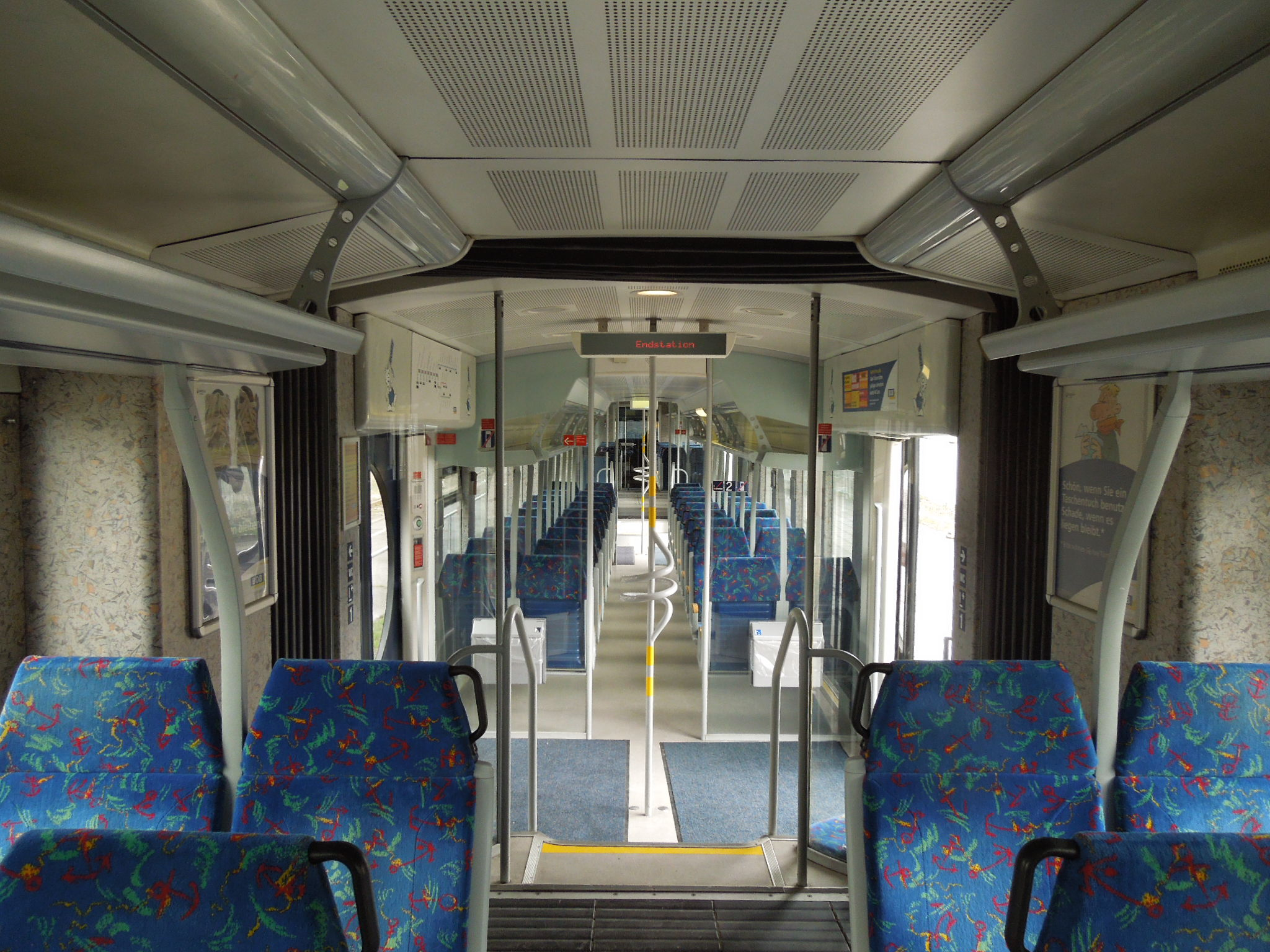 A BOB másodosztályú utastere